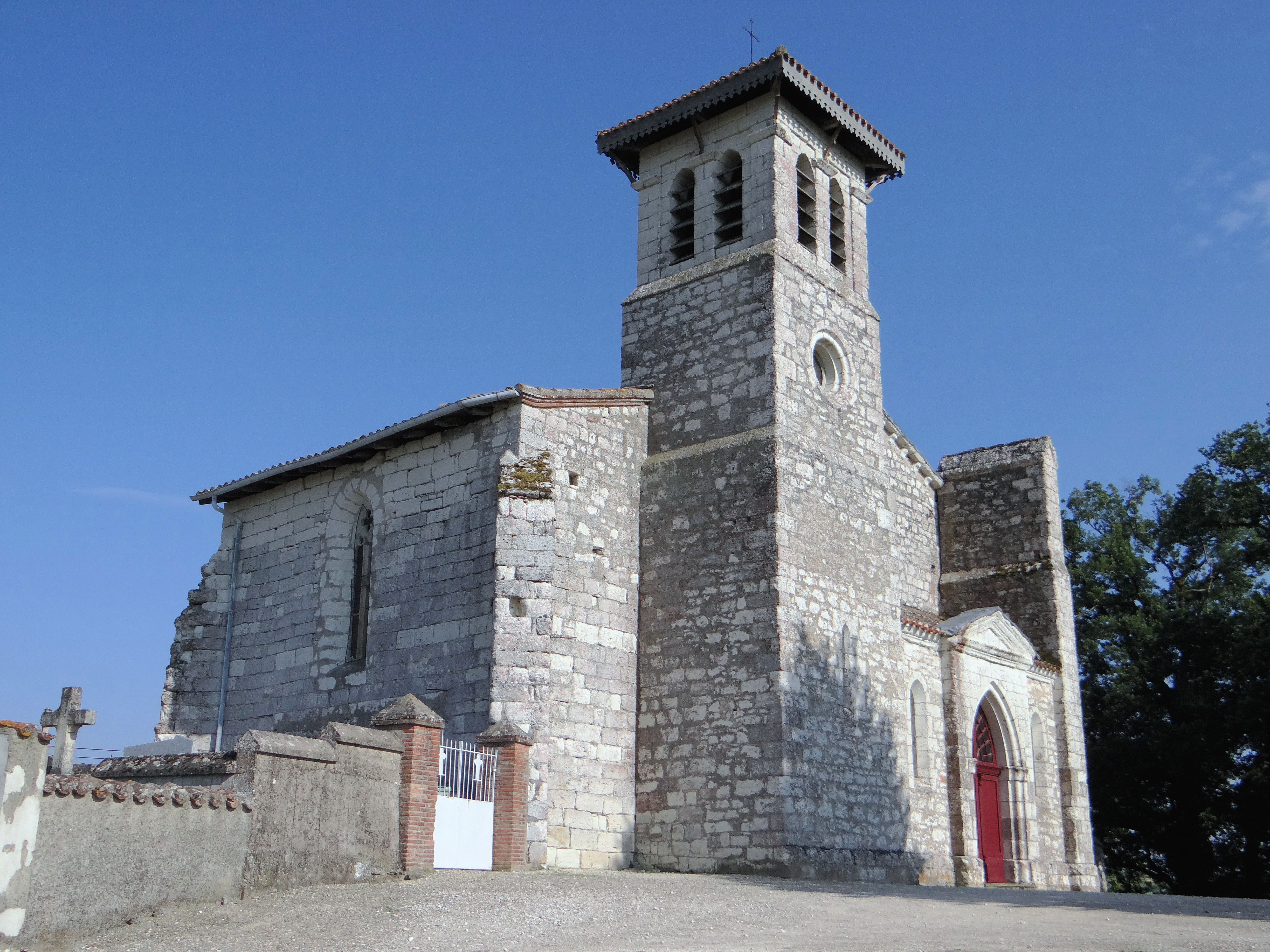 Saint-Paul-d'Espis - Église Saint-Jean de Cornac